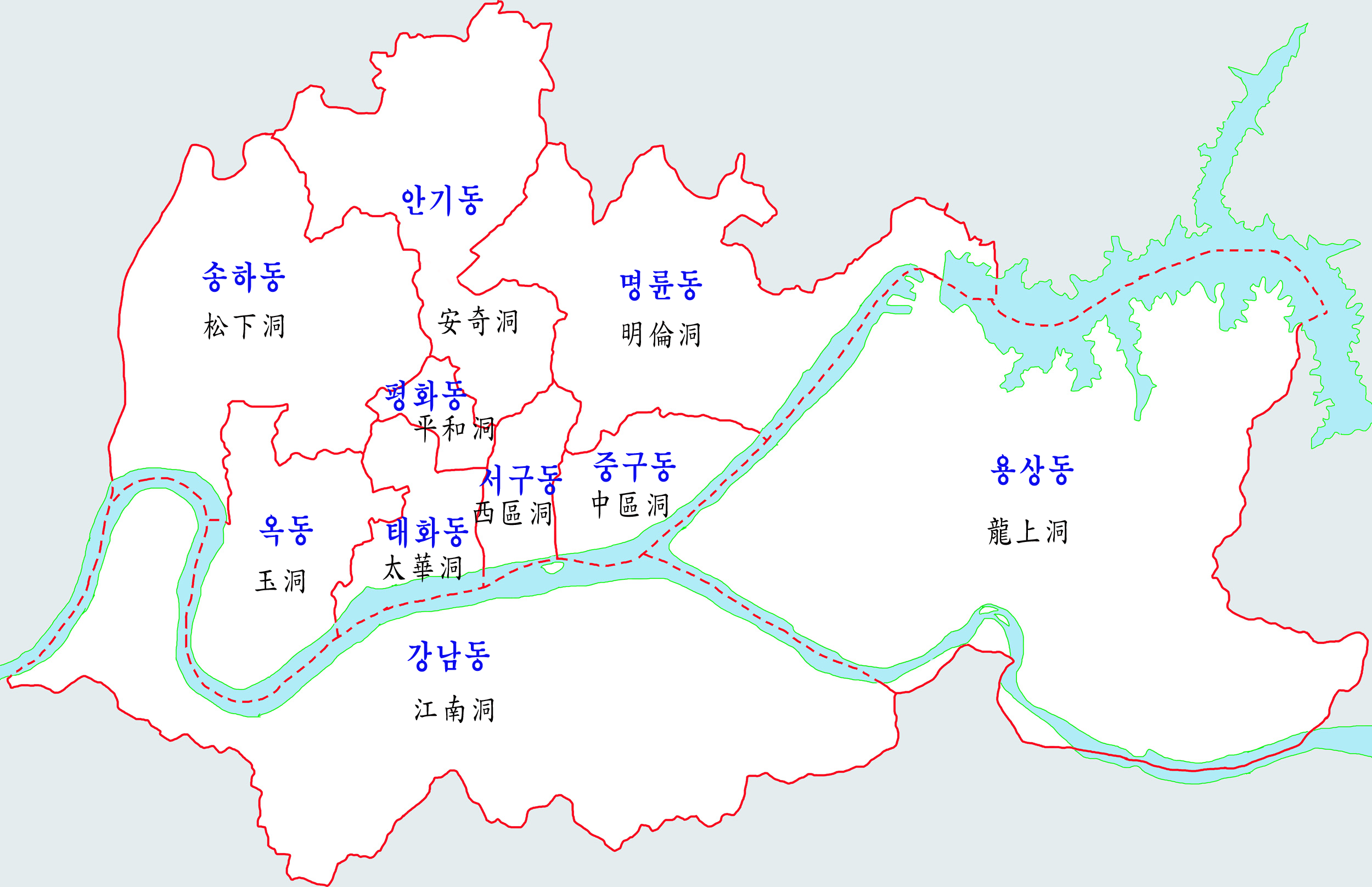 안동시내 지도